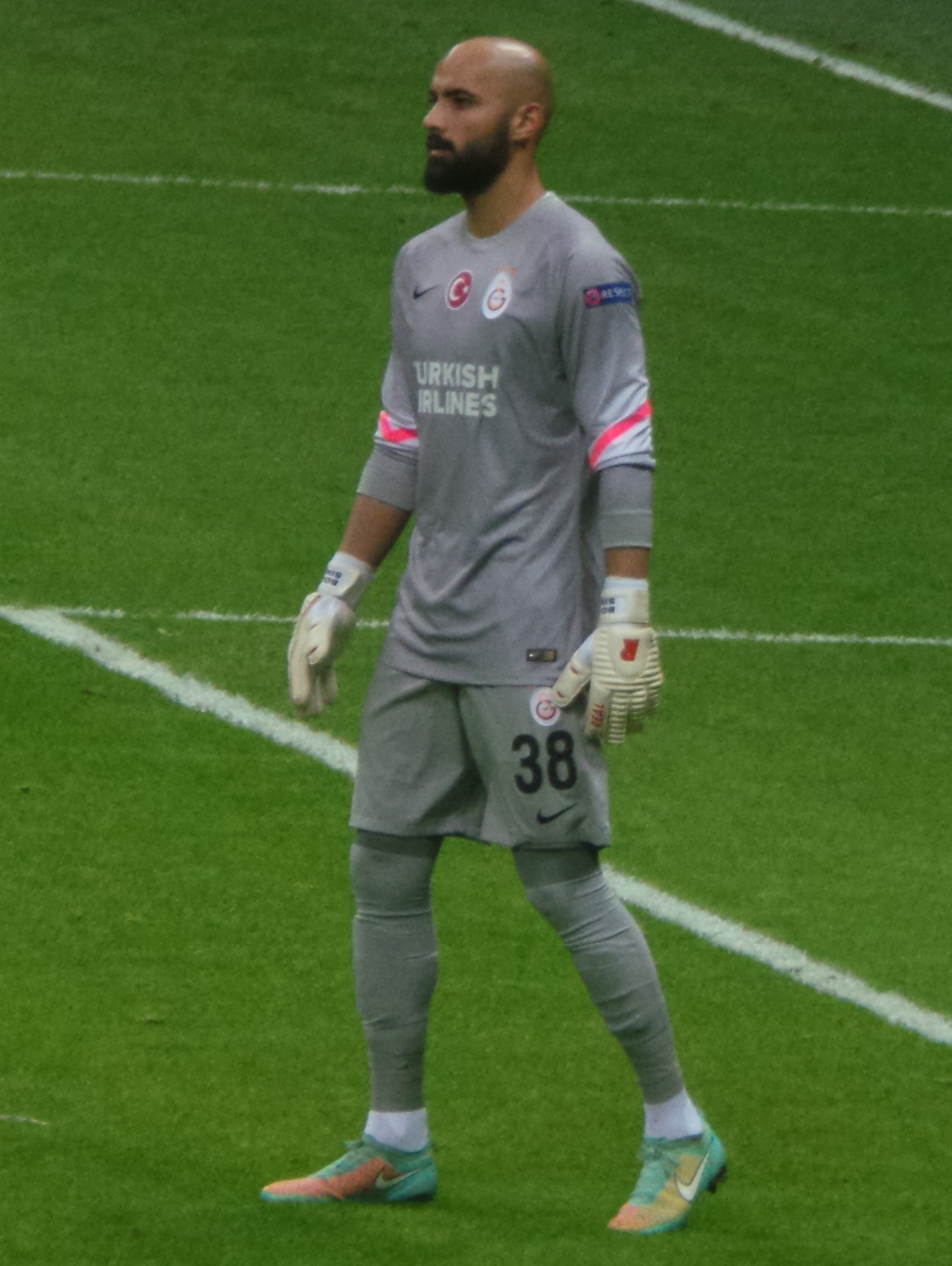 Sinan Bolat